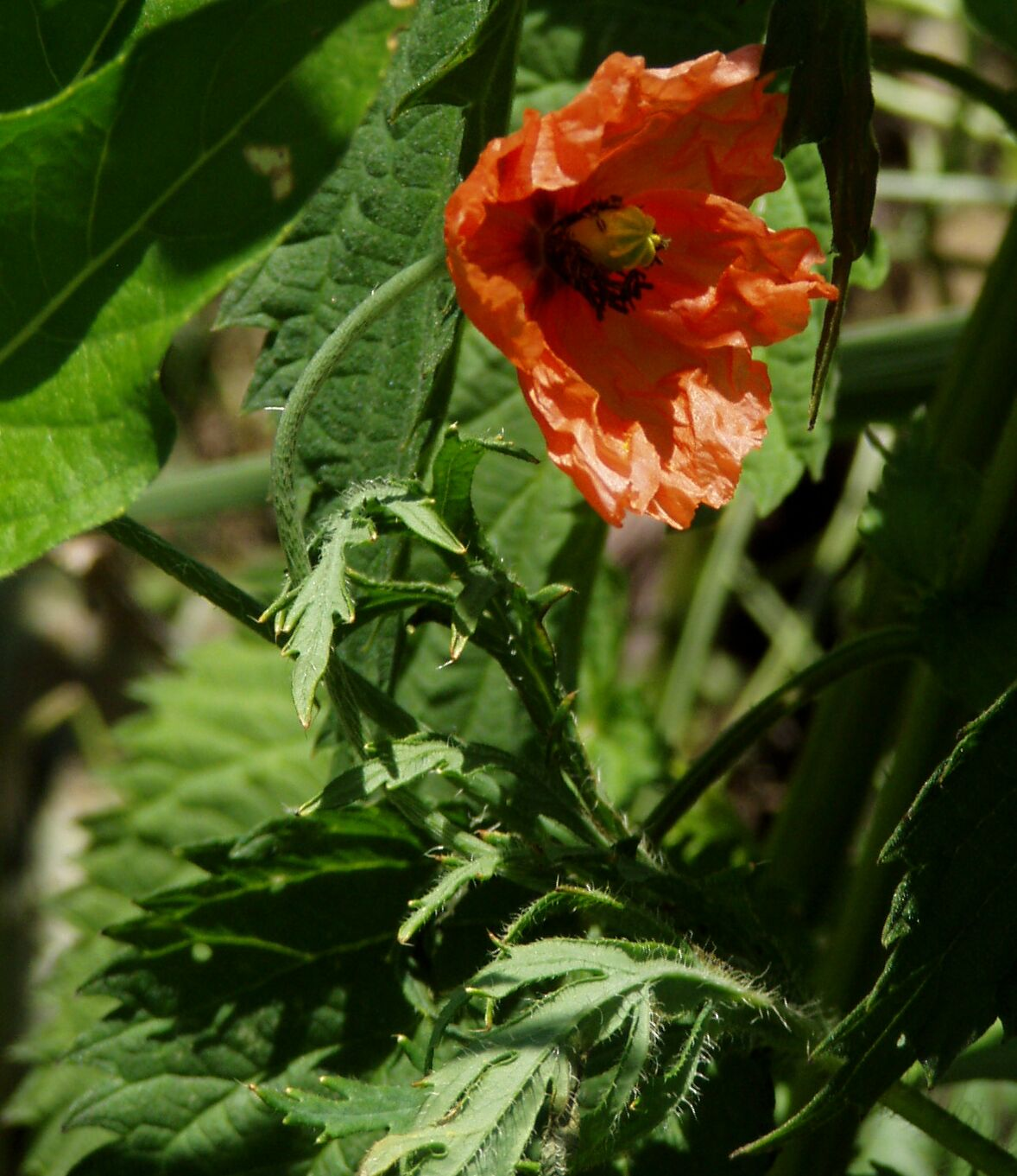 Papaver dubium in the Elbmarschen near Wedel, Hamburg, Germany